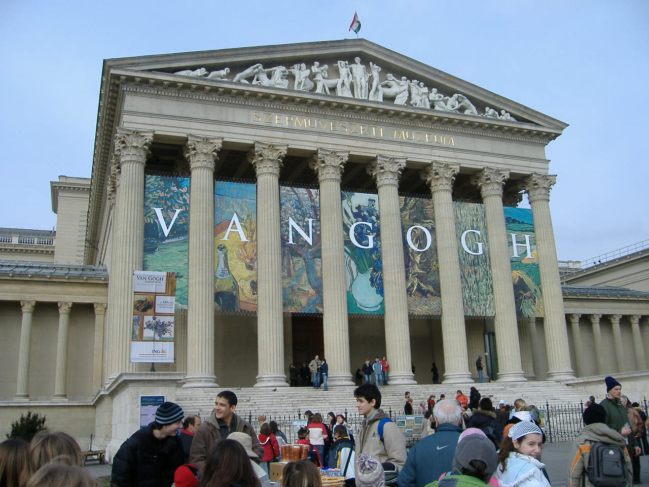 A Szépművészet Múzeum a van Gogh-kiállítás alatt